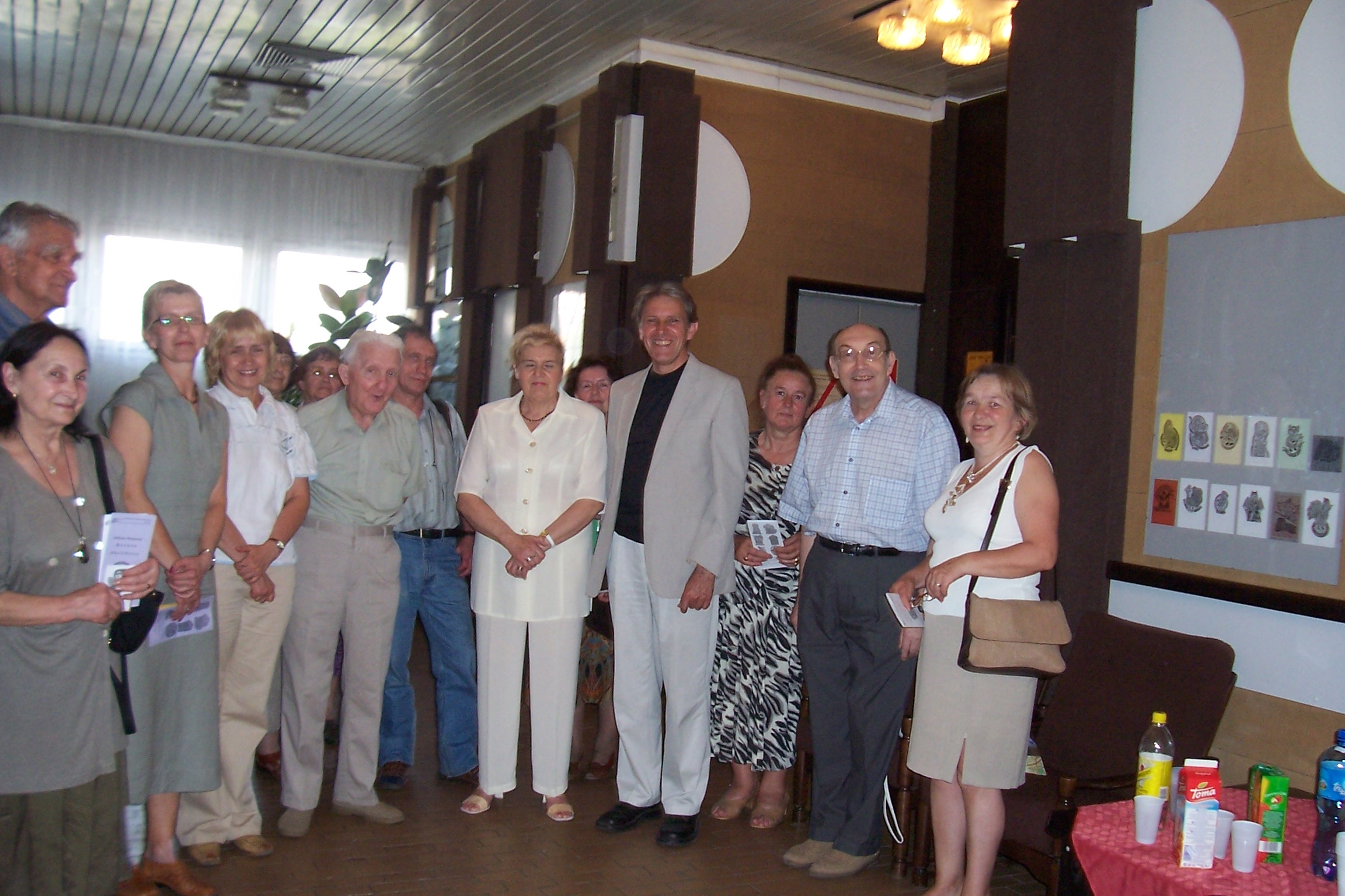 Juliusz Szczęsny Batura na otwarciu swojej wystawy ekslibrisów w 2007 r. w Widzewskiej Galeri Ekslibrisu w Łodzi (autor trzeci z prawej)